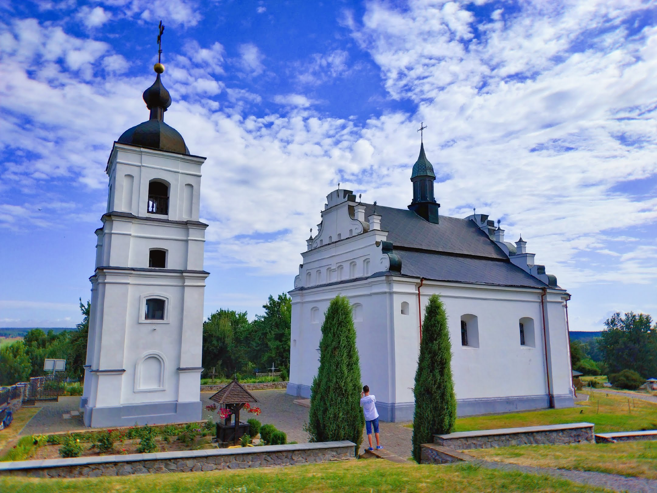 церква в Суботові (Черкащина)